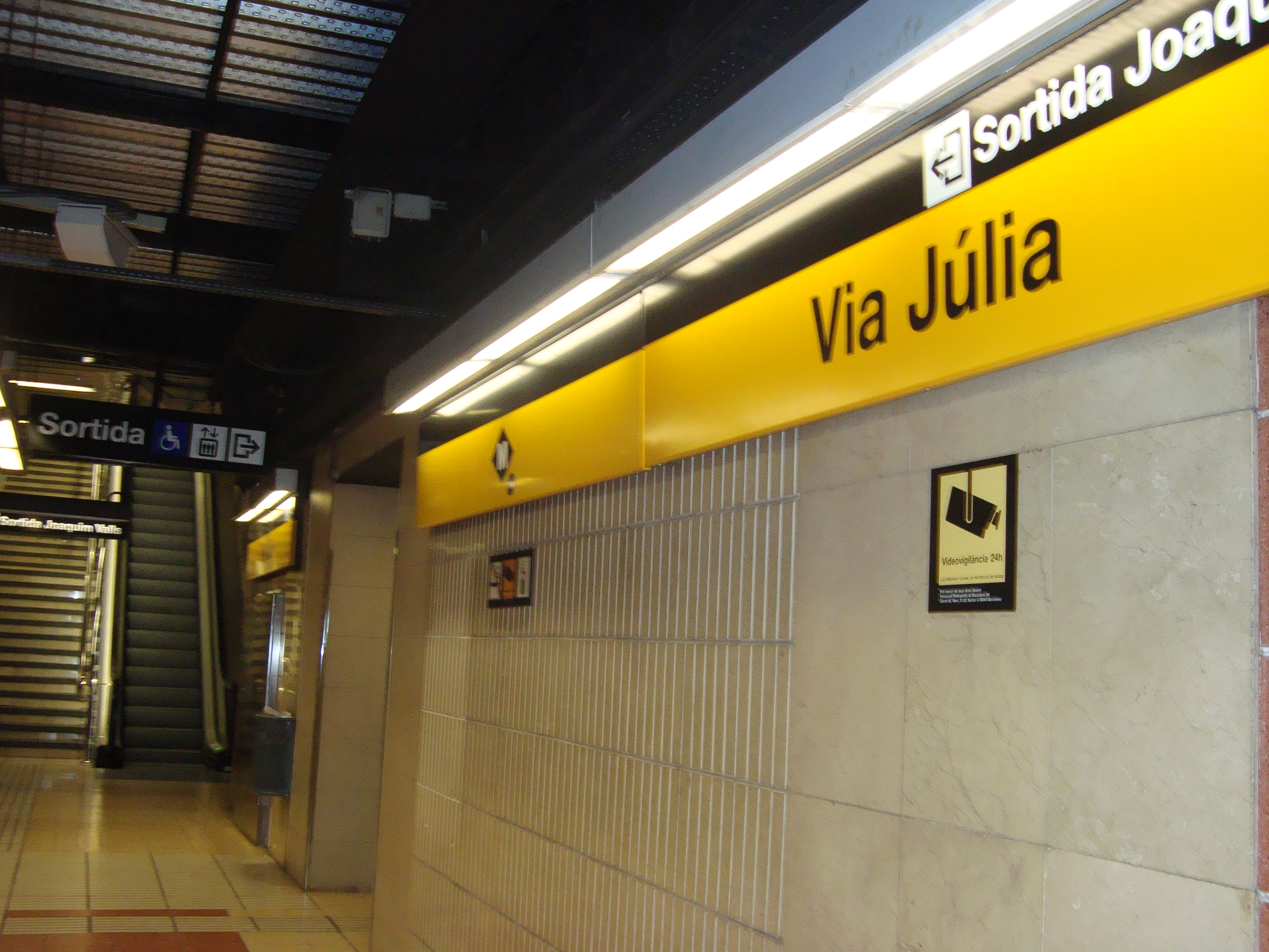 Estació de Via Júlia del metro de Barcelona.